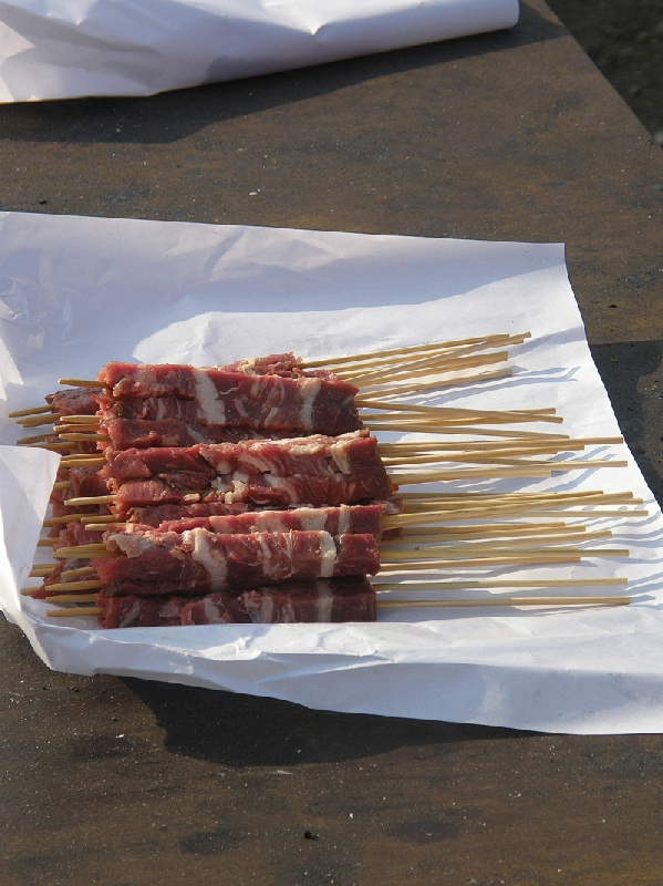 Arrosticini Campo Imperatore